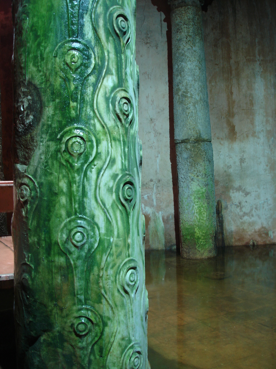 Istanbul: una colonna decorata ellenistica, riusata in epoca bizantina nella cosiddetta Basilica-cisterna (Yereban Sarayi), nei pressi di Hagia Sophia. Foto di: Giovanni Dall'Orto, 29-5-2006.